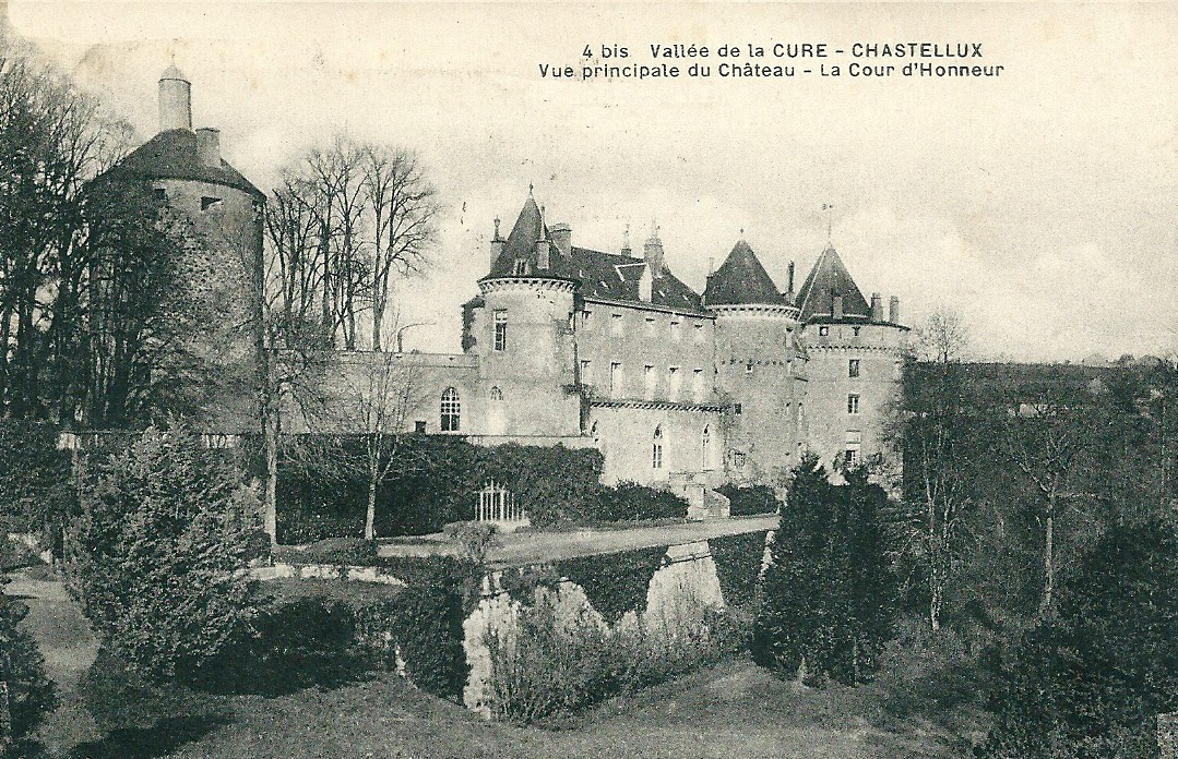 Chastellux (Yonne) - Vue principale du Château ; la cour d'honneur - vers 1925